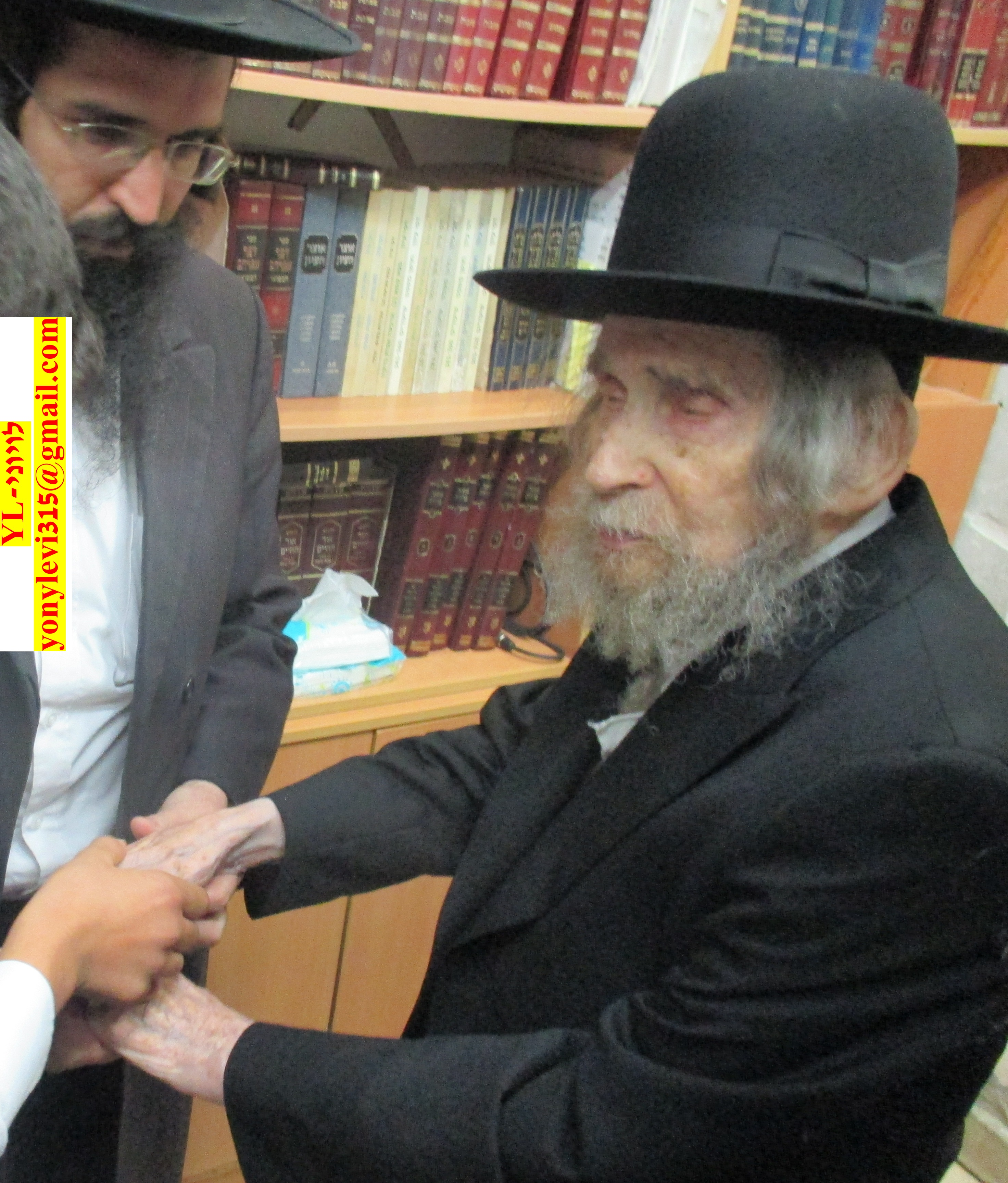 הרב אהרן יהודה לייב שטינמן ז"ל בשלהי ימיו